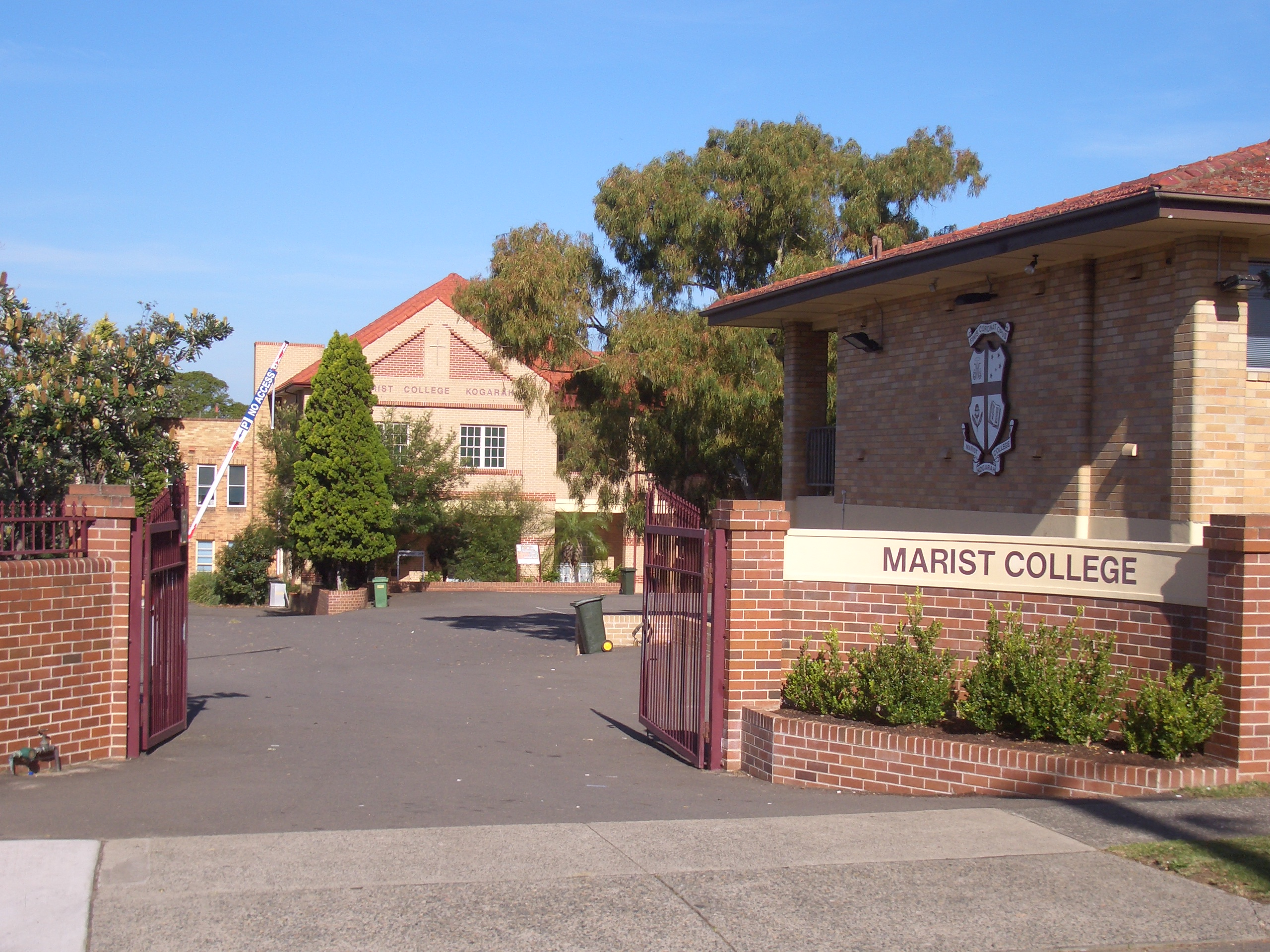 Kogarah_Marist_College, Bexley